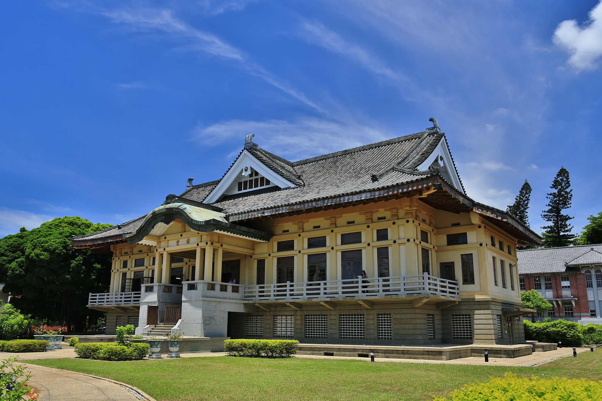 台南市忠義國小禮堂原武德殿